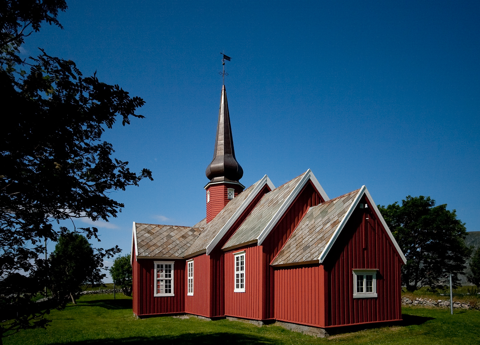 Flakstad kyrkje